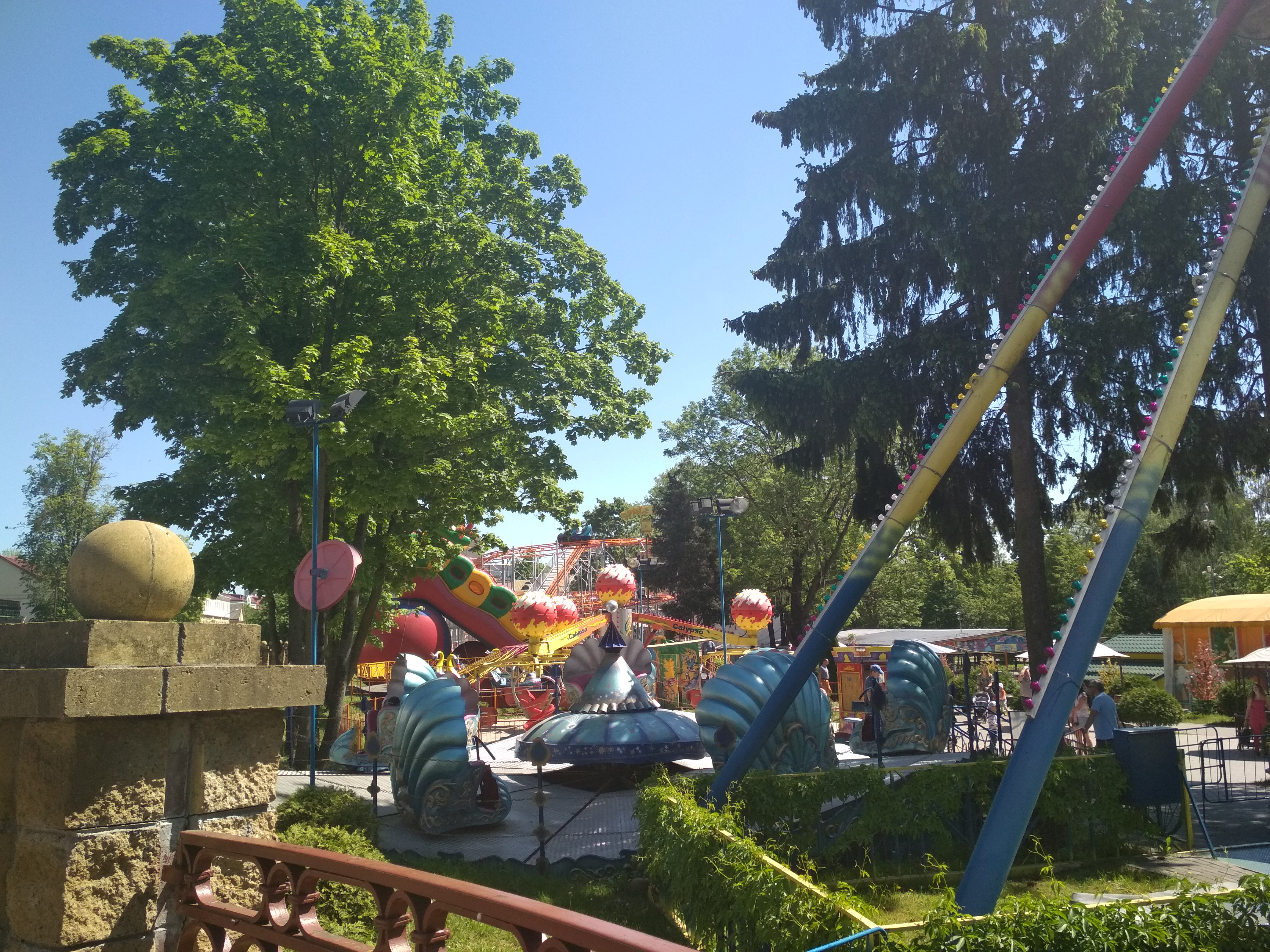 Гродна (2018). Парк Жылібера